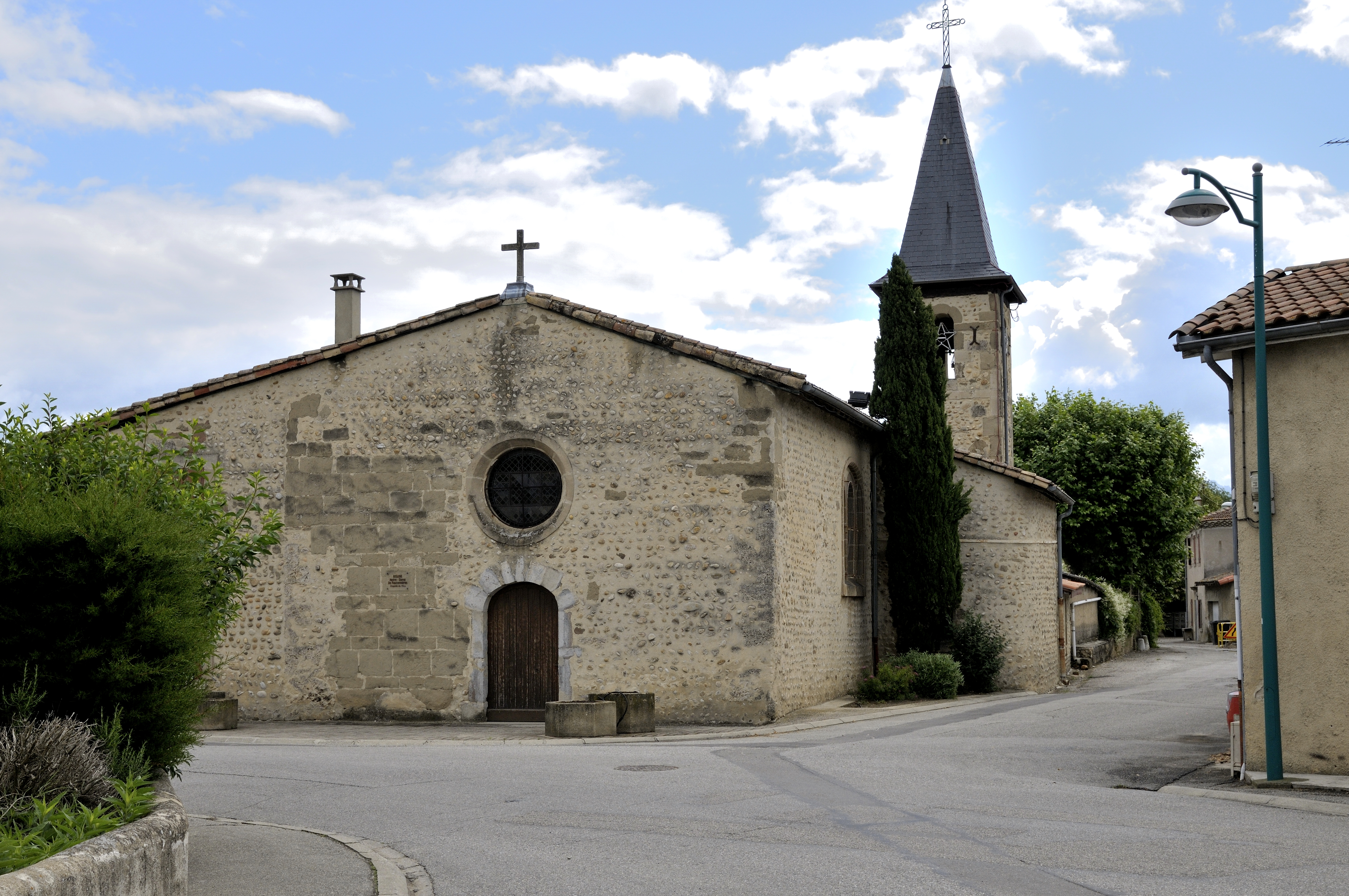 chapelle du XVIIem